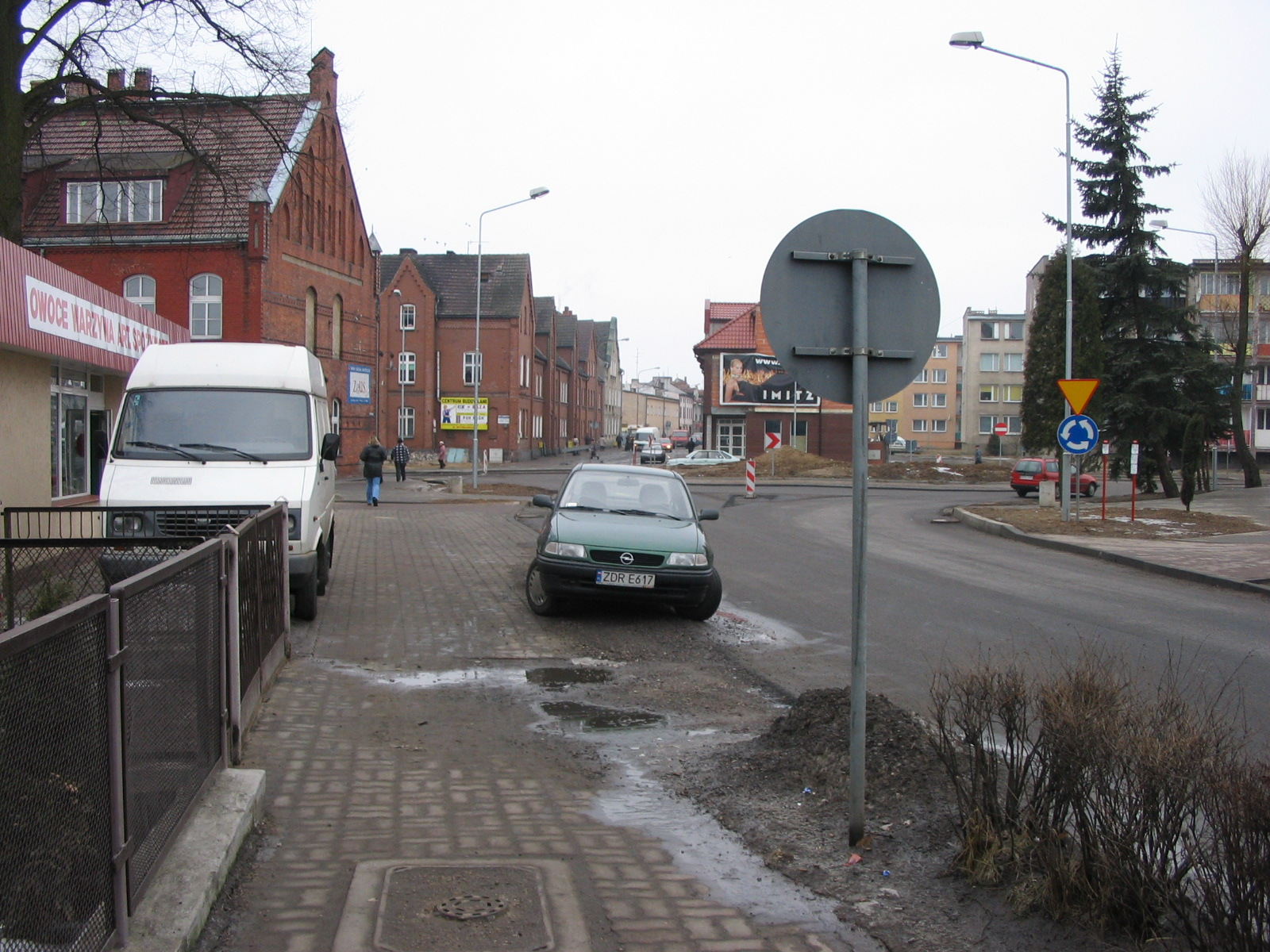 Złocieniec